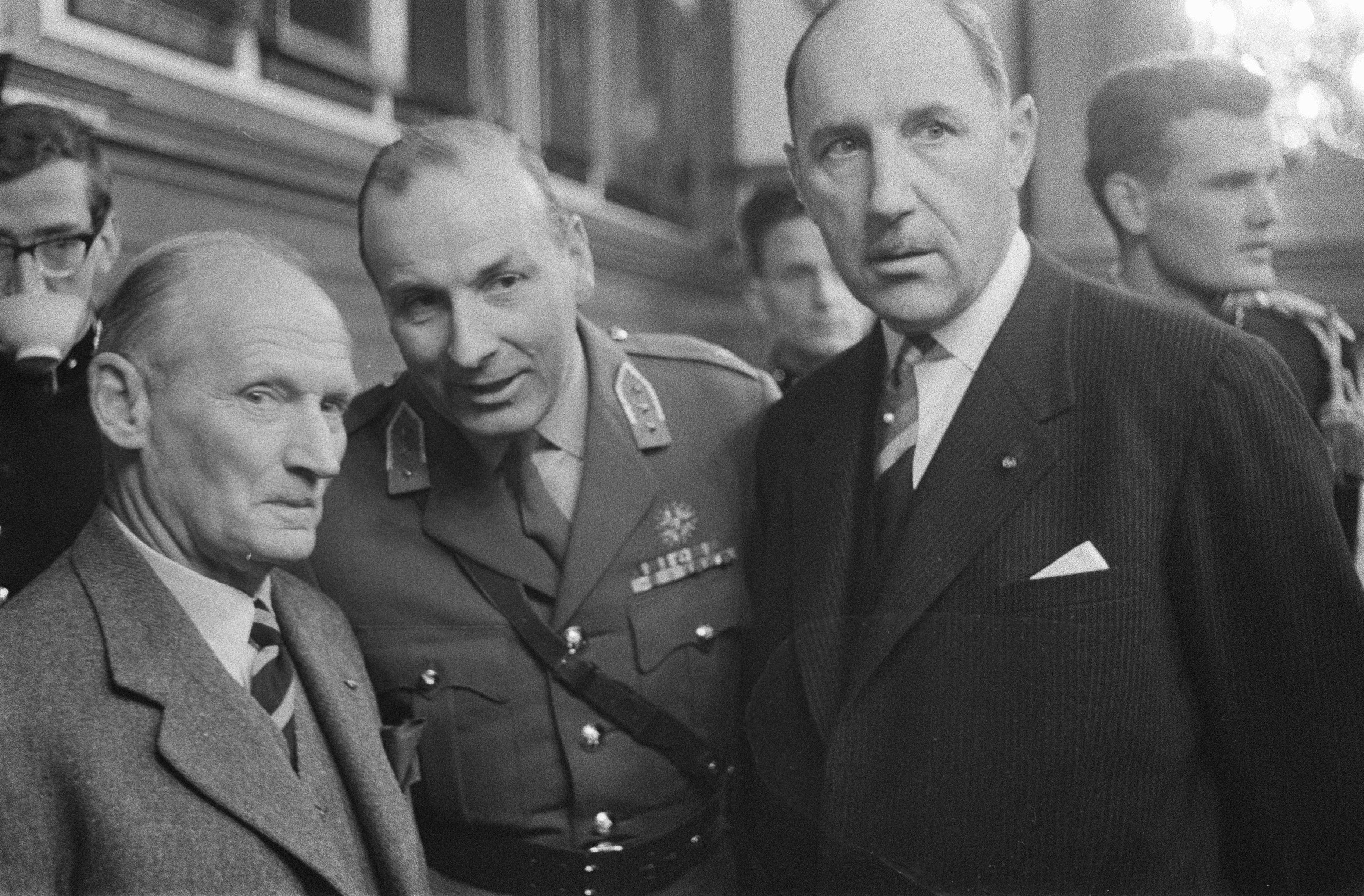 Collectie / Archief : Fotocollectie Anefo Reportage / Serie : [ onbekend ] Beschrijving : Veldmaarschalk Montgomery houdt lezing t.g.v. het 16e lustrum van de Koninklijke Studenten Schietvereniging in de aula van de gem. Universiteit Datum : 9 november 1960 Trefwoorden : aulas, universiteiten Persoonsnaam : Montgomery, Bernard Fotograaf : Rossem, Wim van / Anefo Auteursrechthebbende : Nationaal Archief Materiaalsoort : Negatief (zwart/wit) Nummer archiefinventaris : bekijk toegang 2.24.01.05 Bestanddeelnummer : 911-7518